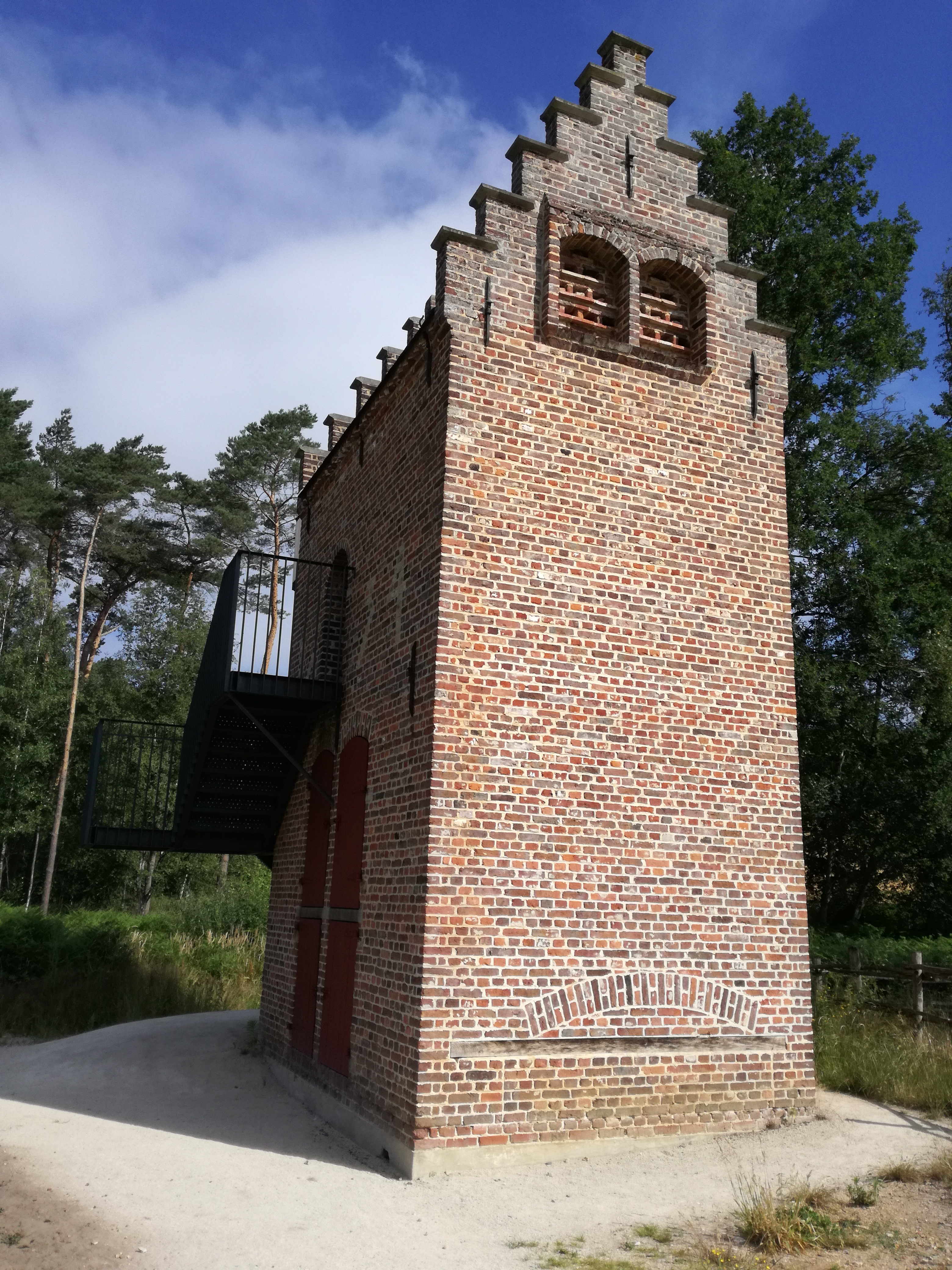 De duiventoren in Ingelmunster stond bij de hoeve die hoorde bij het kasteel van Ingelmunster. De toren is gebouwd in 1634 en verving een ouder exemplaar. De duiven zaten op de tweede verdieping. Om te voorkomen dat er duiven werd gestolen kon je er enkel via een ladder naartoe. Op de eerste verdieping van de toren was een opslagplaats voor dierenvoeder. Op het gelijkvloers was er ruimte voor kippen of varkens. In 1796 schafte het Franse bewind het voorrecht van adel en kerk af om duiven te houden. In 1973 werd de duiventoren van Ingelmunster door gravin de Montblanc geschonken aan het Openluchtmuseum Bokrijk. Daar is hij heropgebouwd en gerestaureerd. This photo of immovable heritage has been taken in the Flemish Region